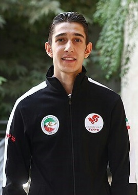 فرزان عاشورزاده فلاح